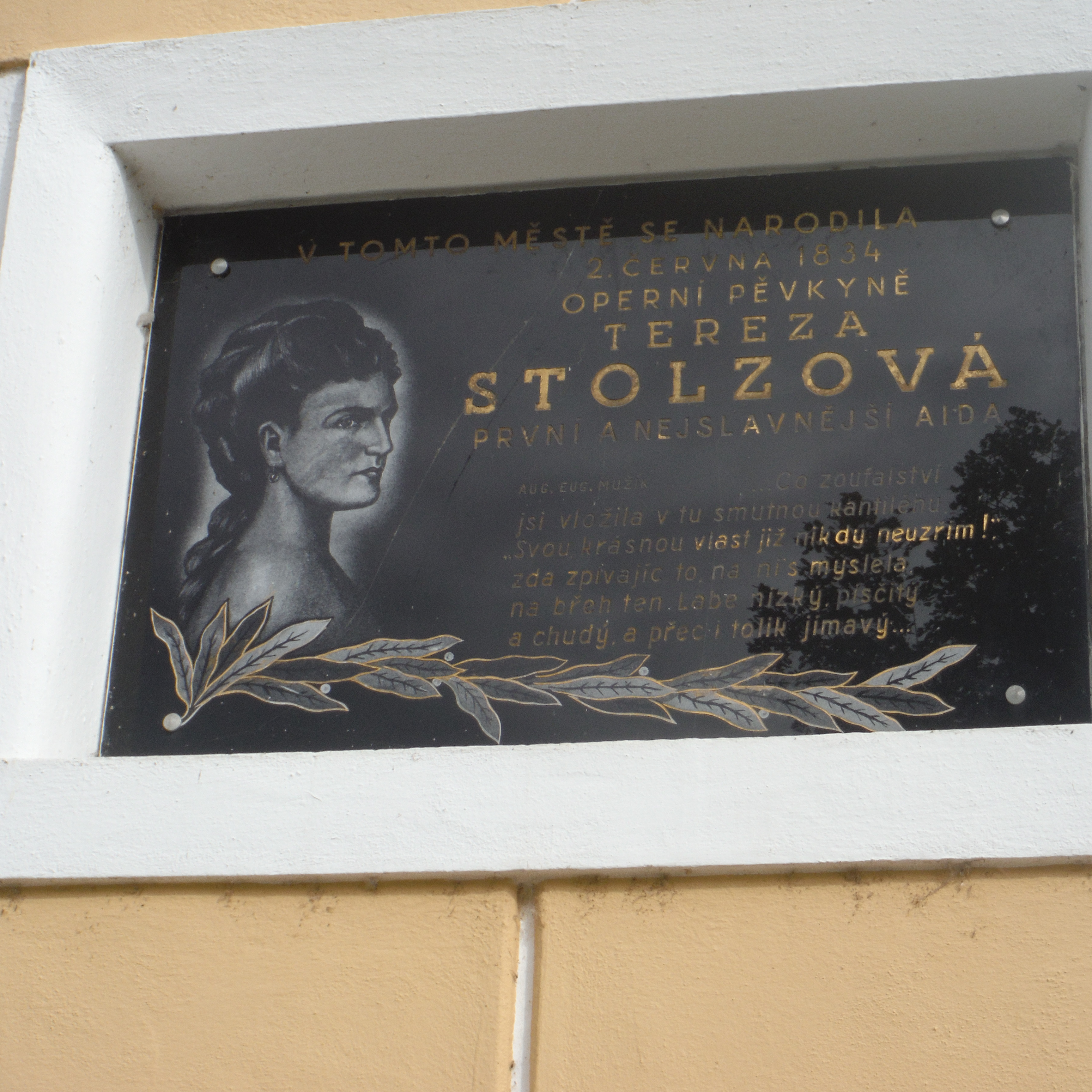 deska